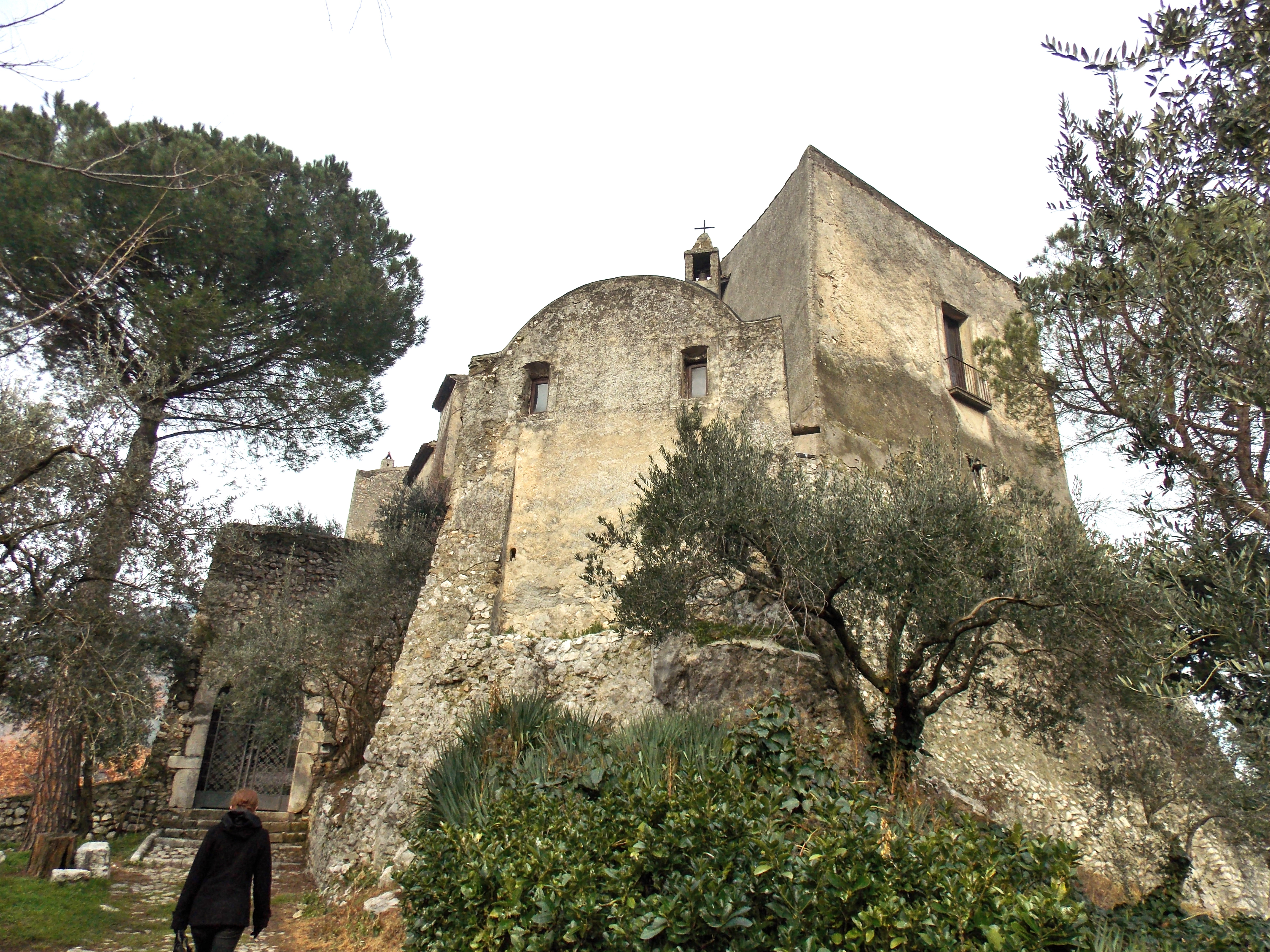 Castello Pignatelli della Leonessa a San Martino Valle Caudina (AV). Retro della cappella gentilizia